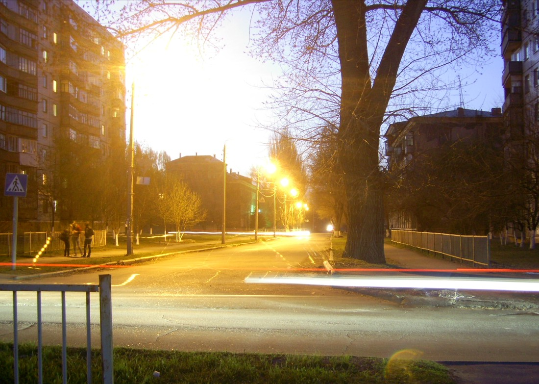 Пересечение улиц Школьная и Большая Садовая, г. Краматорск